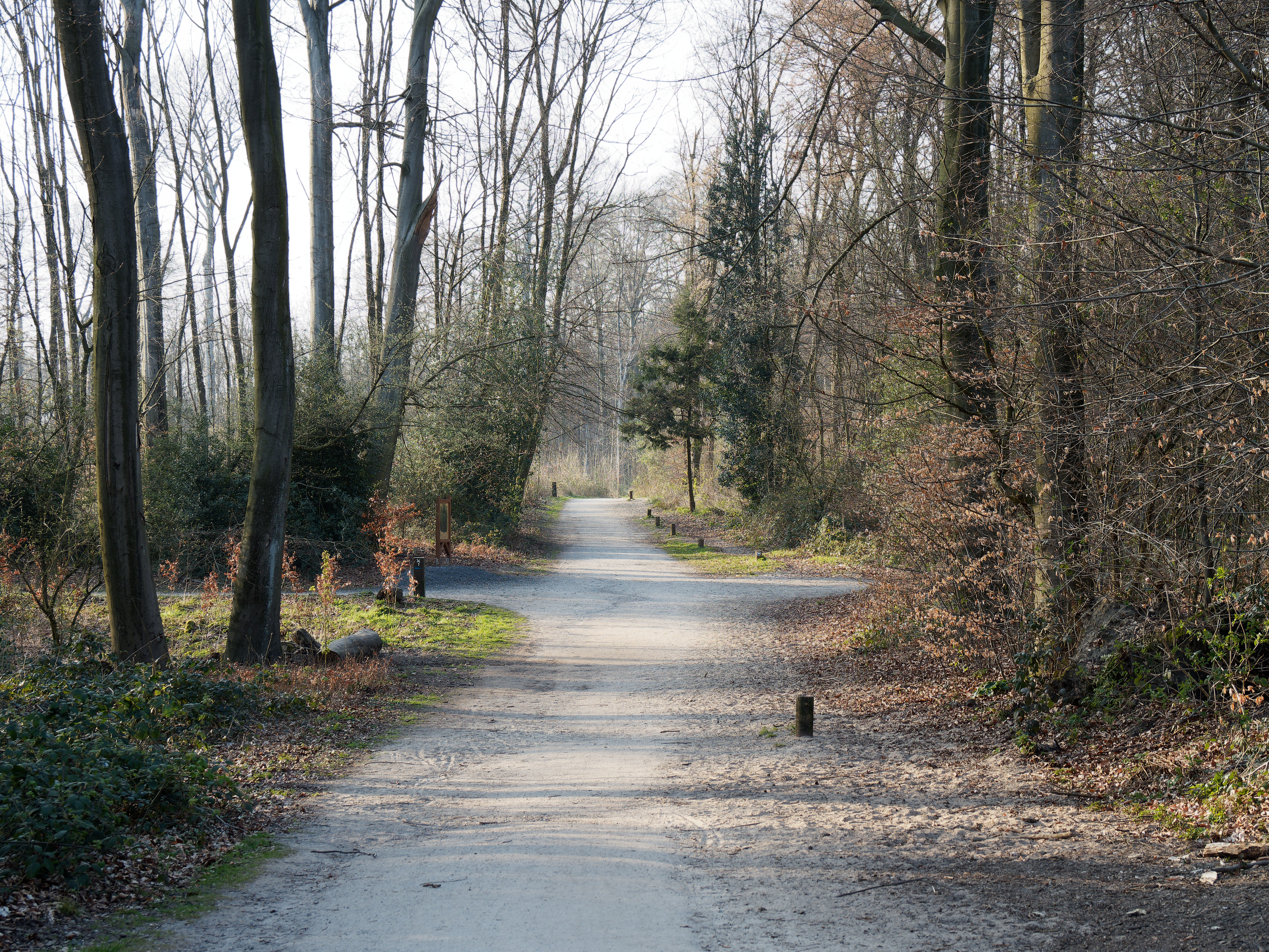 Der Hauptweg (Nord-West/Süd-Ost) im Gysenberg, Blickrichtung NW.